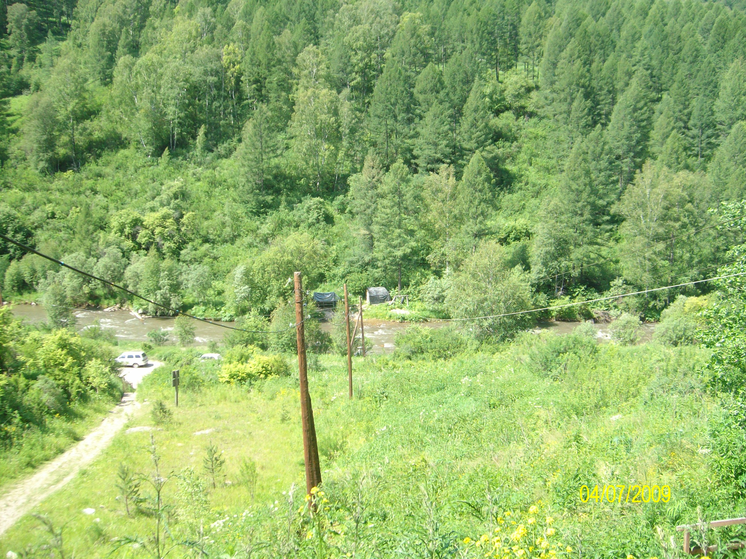 Канатная дорога, используемая археологами для доставки грунта к промывке